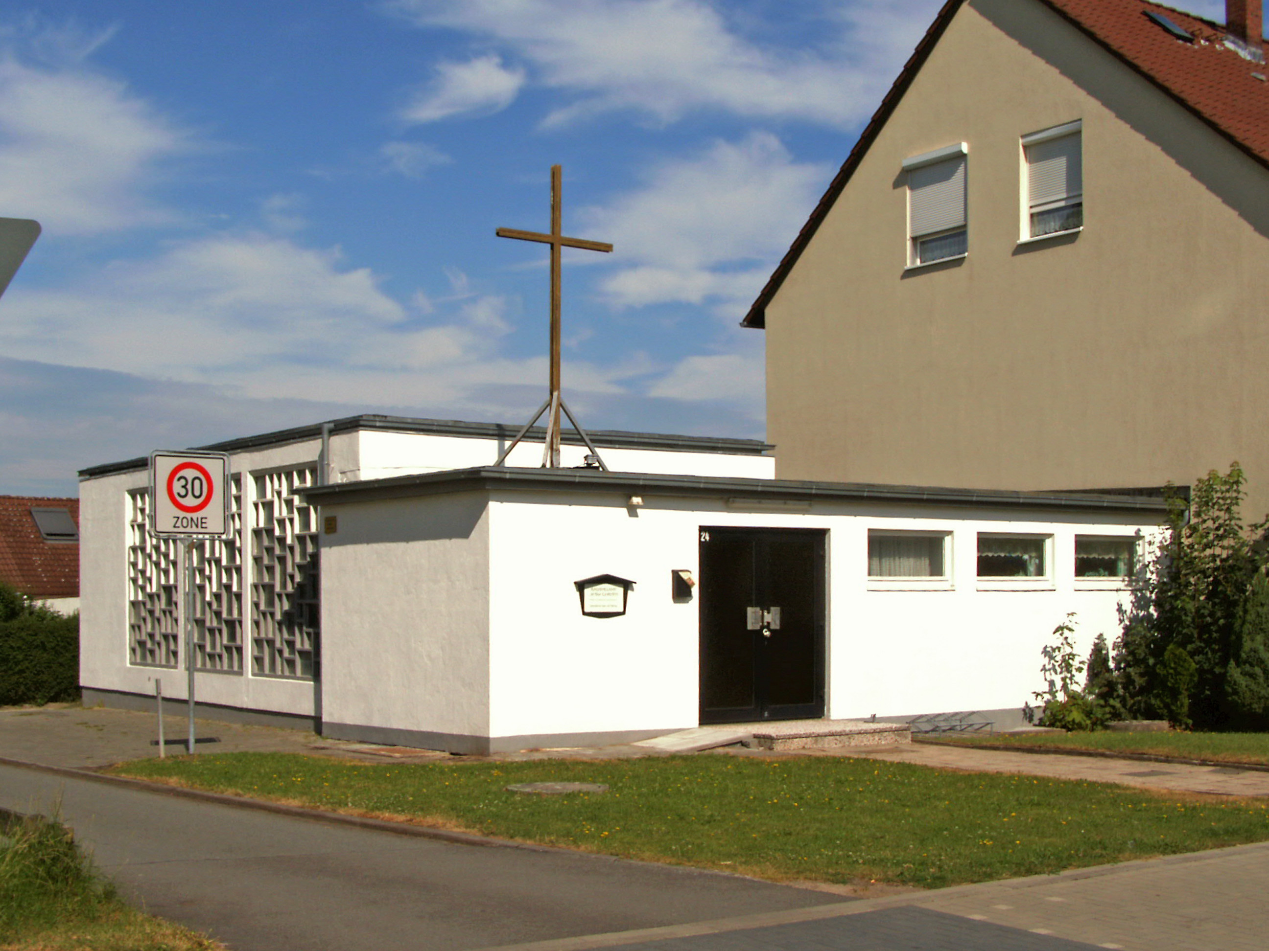 Kirche "Apostelamt Jesu Christi" in Wolfsburg, Grauhorststraße 24